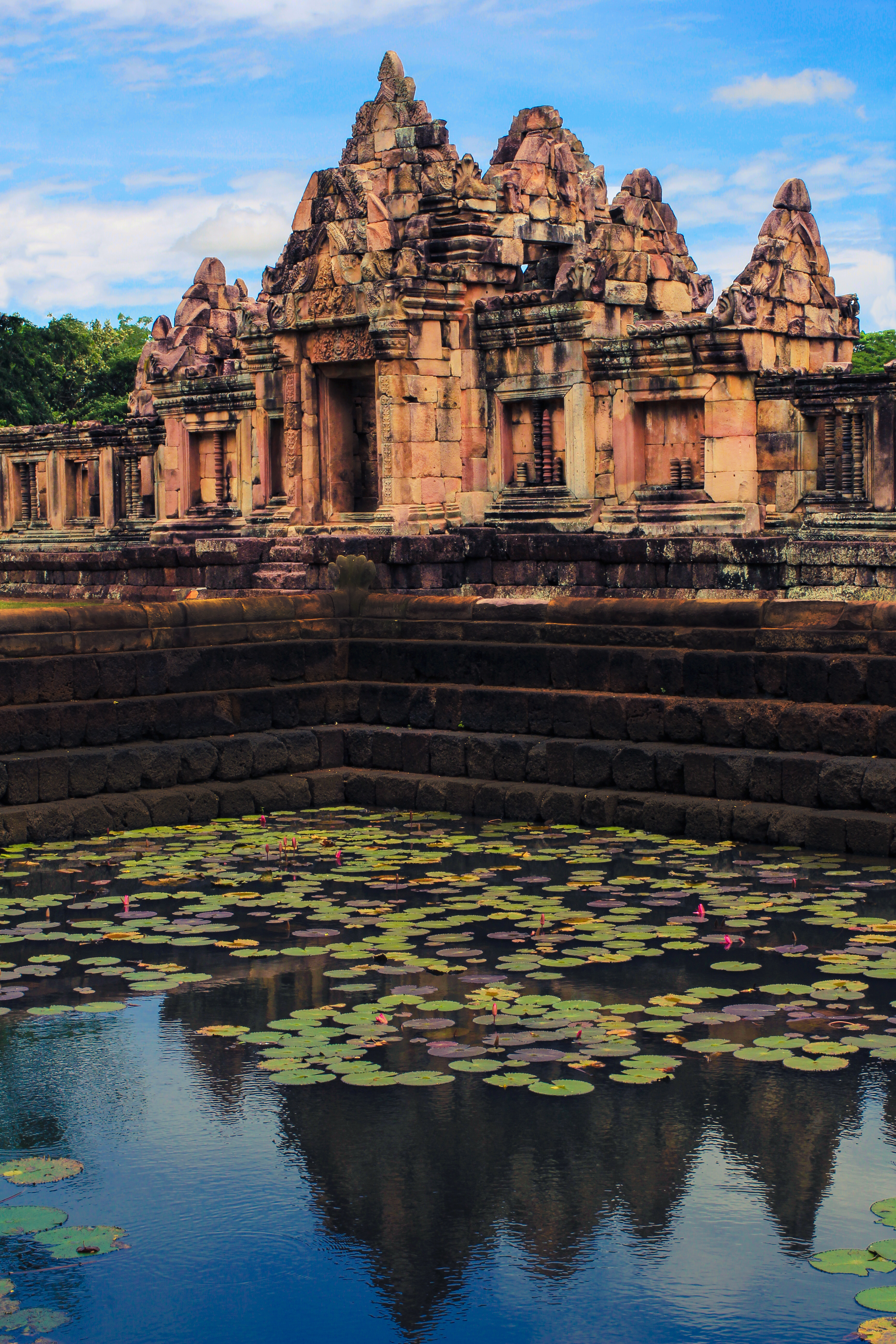 ภาพตัวปราสาทเมืองต่ำสถาปัตยกรรมสะท้อนกับผิวน้ำในสระบริเวณโดยรอบ